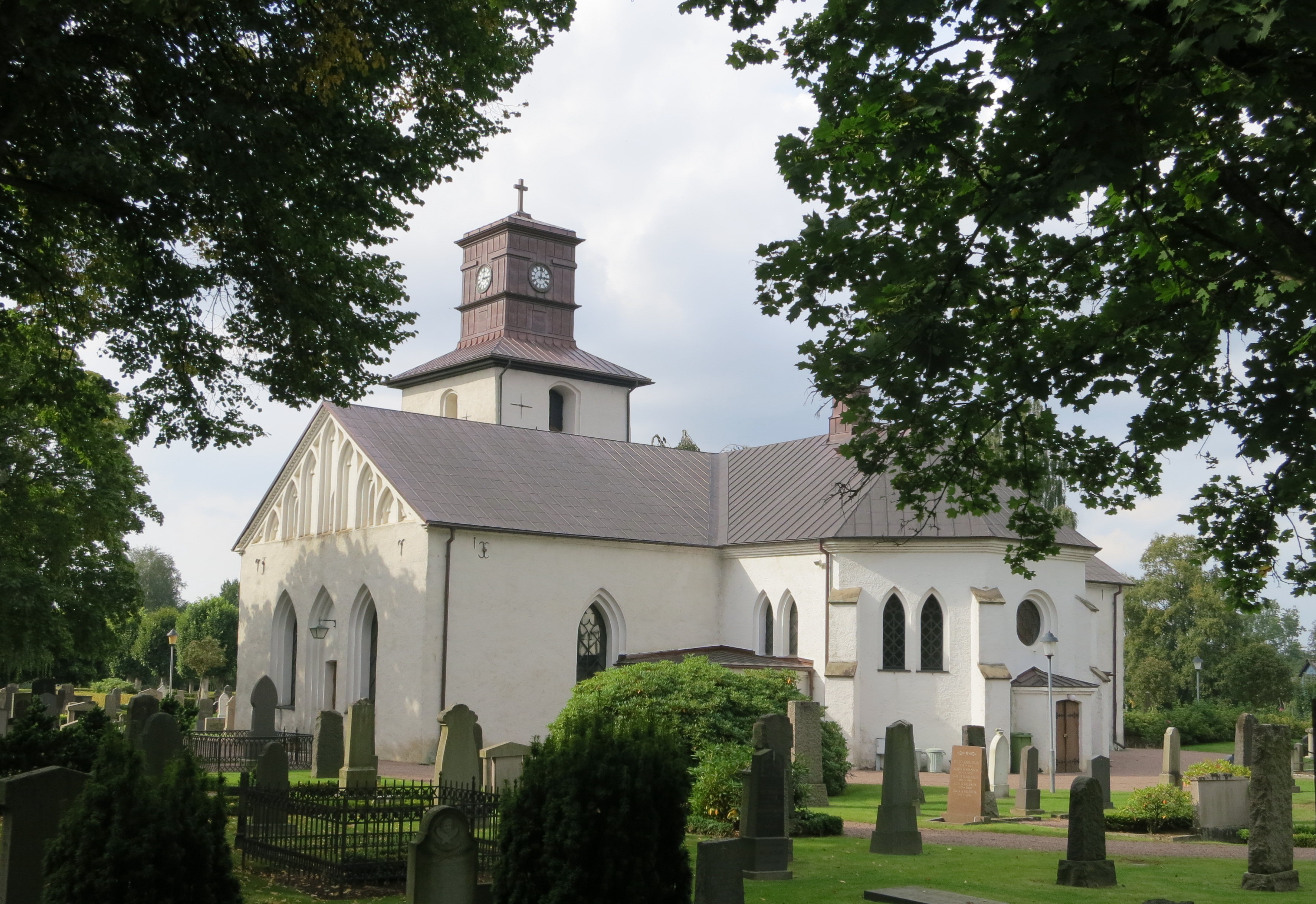 Strövelstorps kyrka (Strövelstorp 46:1)